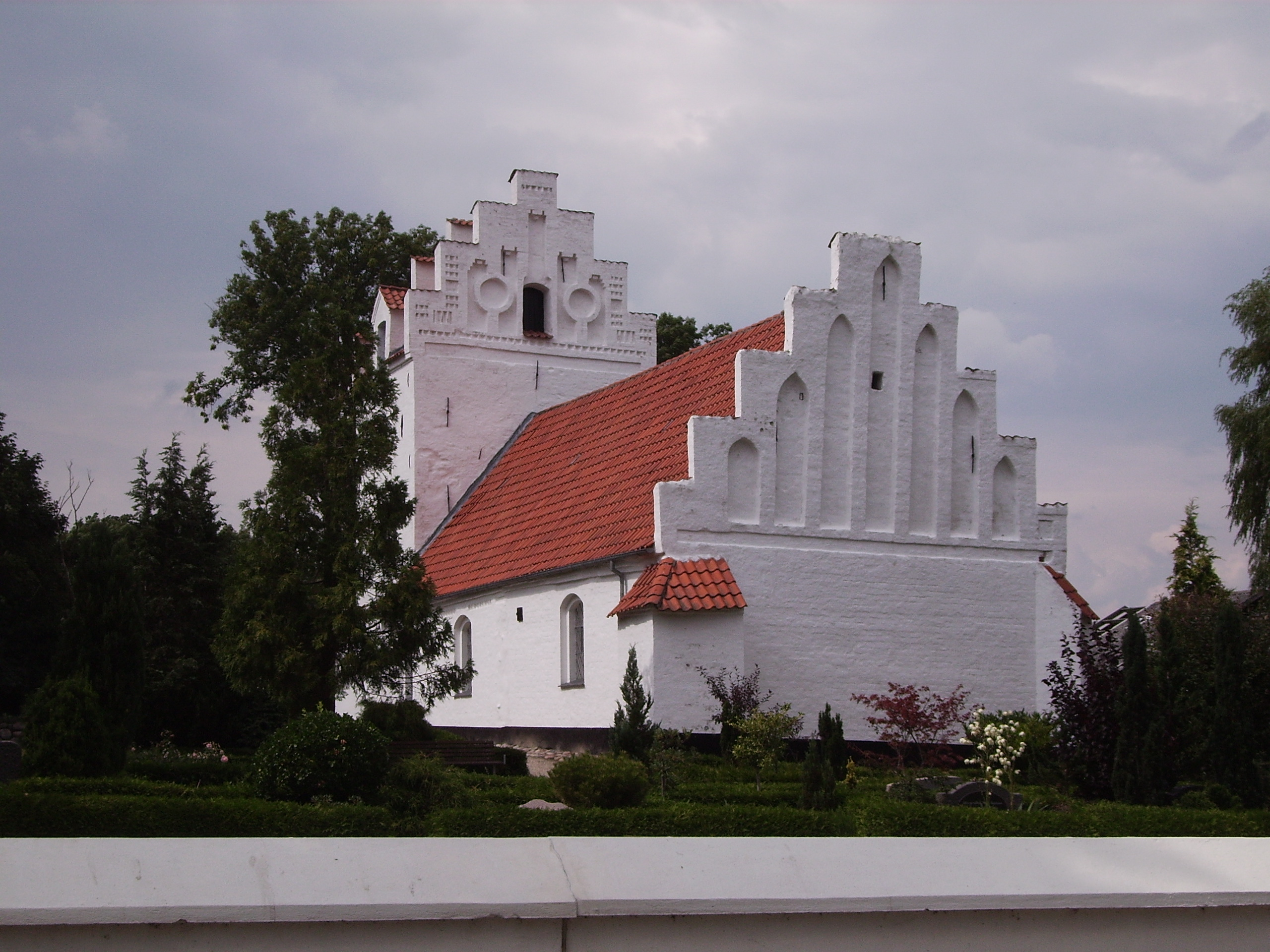 Nørre Højrup Kirke, Nørre Højrup Sogn, Skam Herred, Odense Amt, Denmark (Danish Church) - Nørre Højrup Kirke fra øst